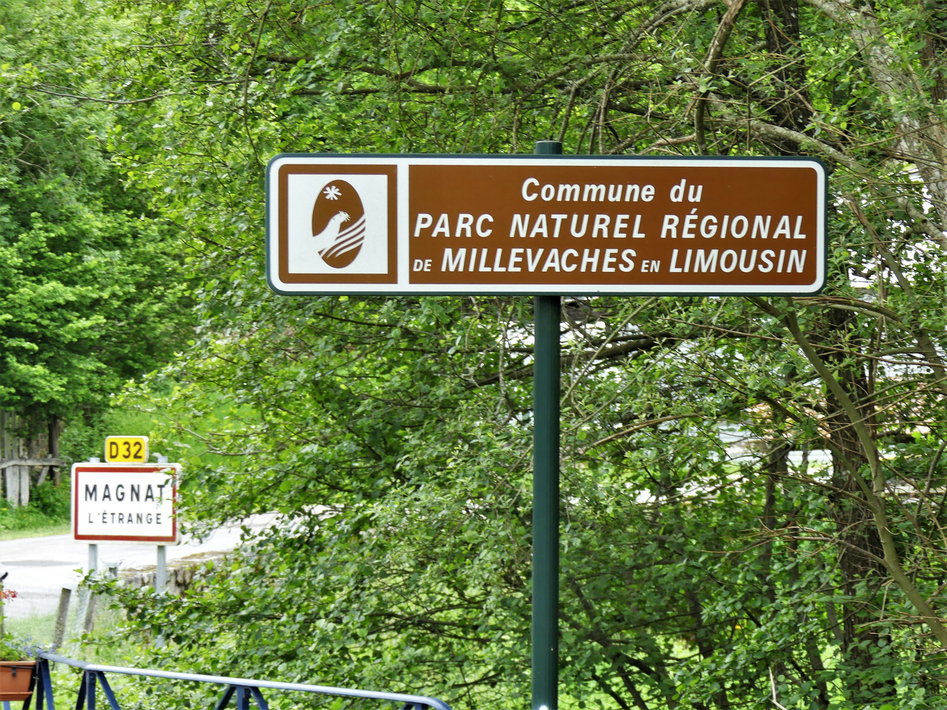 Panneau du parc naturel régional de Millevaches en Limousin à l'entrée du bourg de Magnat-l'Étrange, Creuse, France.